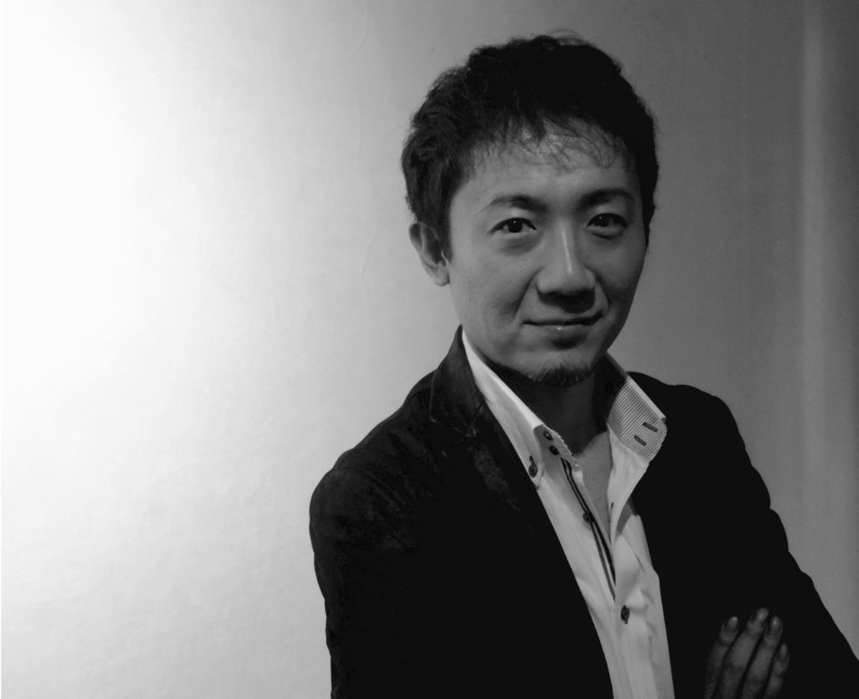 書家 田中逸齋の個人写真